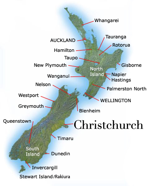 Version mit Christchurch